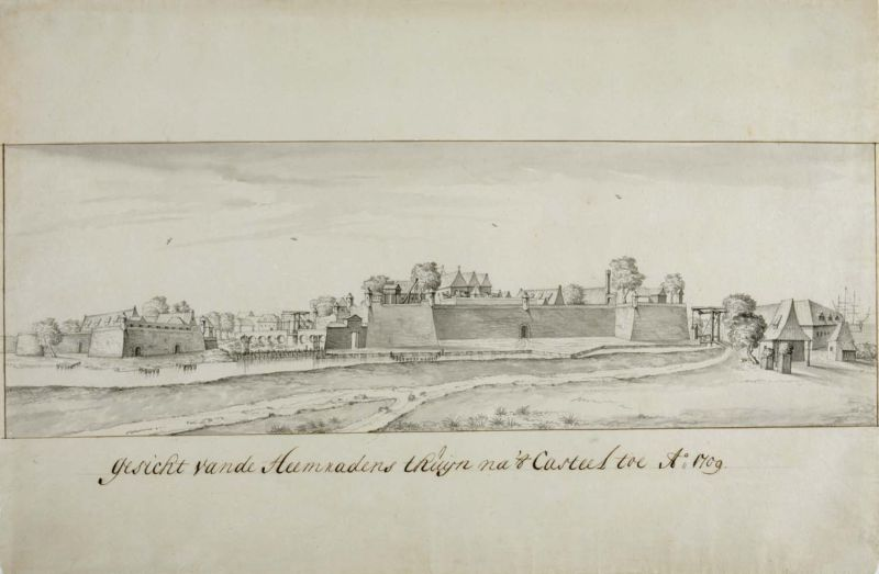 Tekening. Te zien is Het Kasteel met de punten Robijn (links) en Saffier (rechts).. Het Kasteel van Batavia